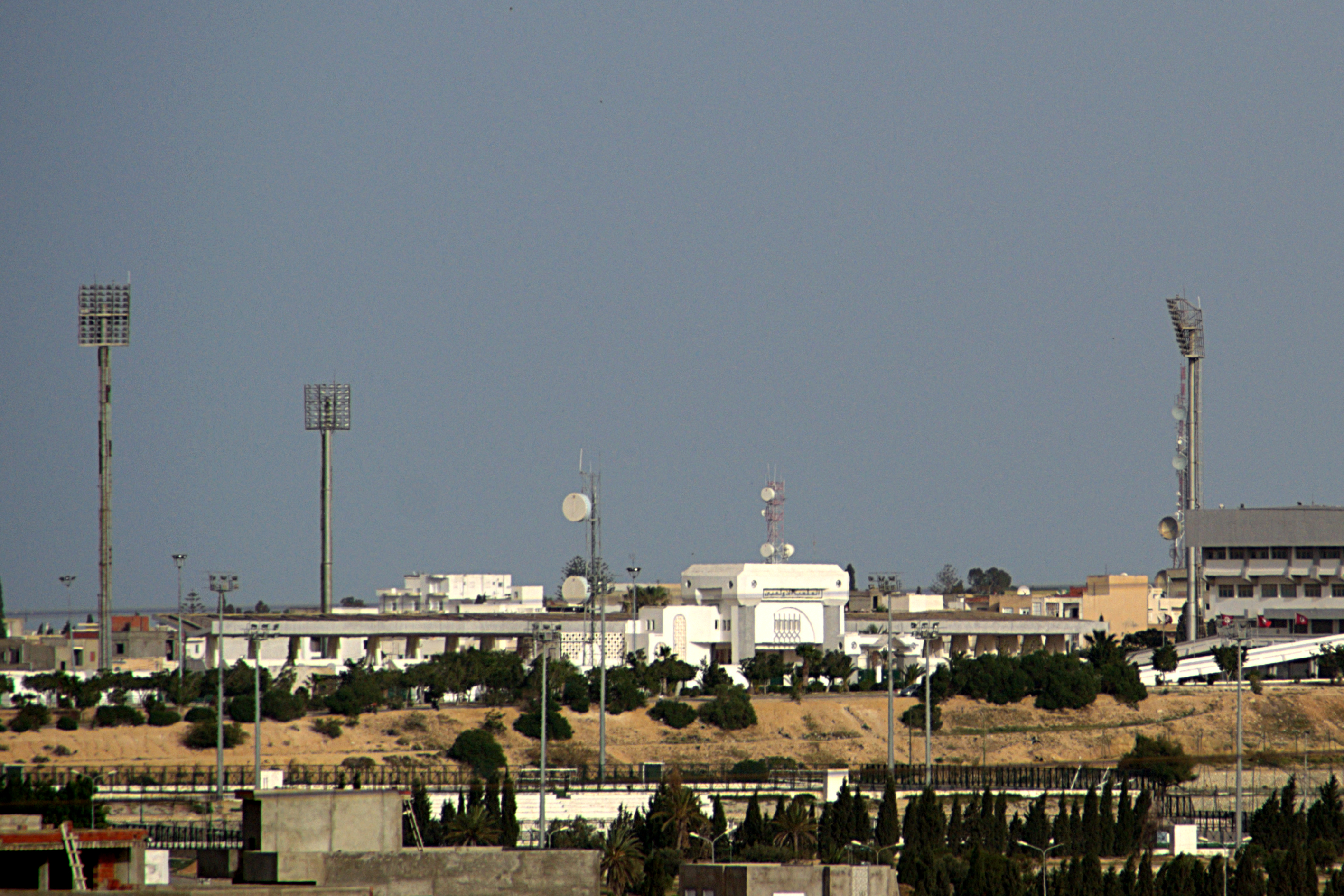 Vue de la ville de Sousse